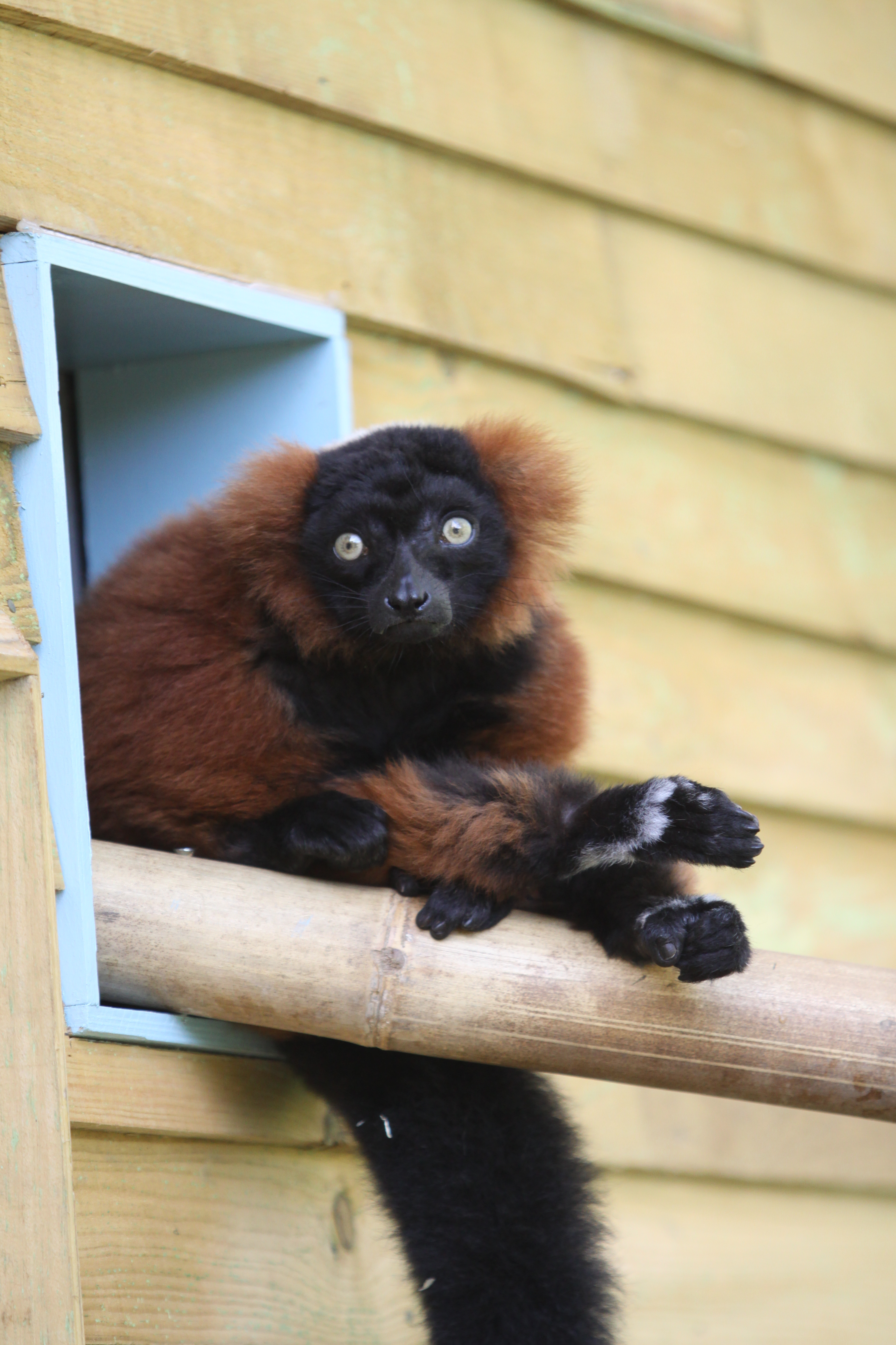 Rote Vari (Varecia rubra) bei Durrell Wildlife Park